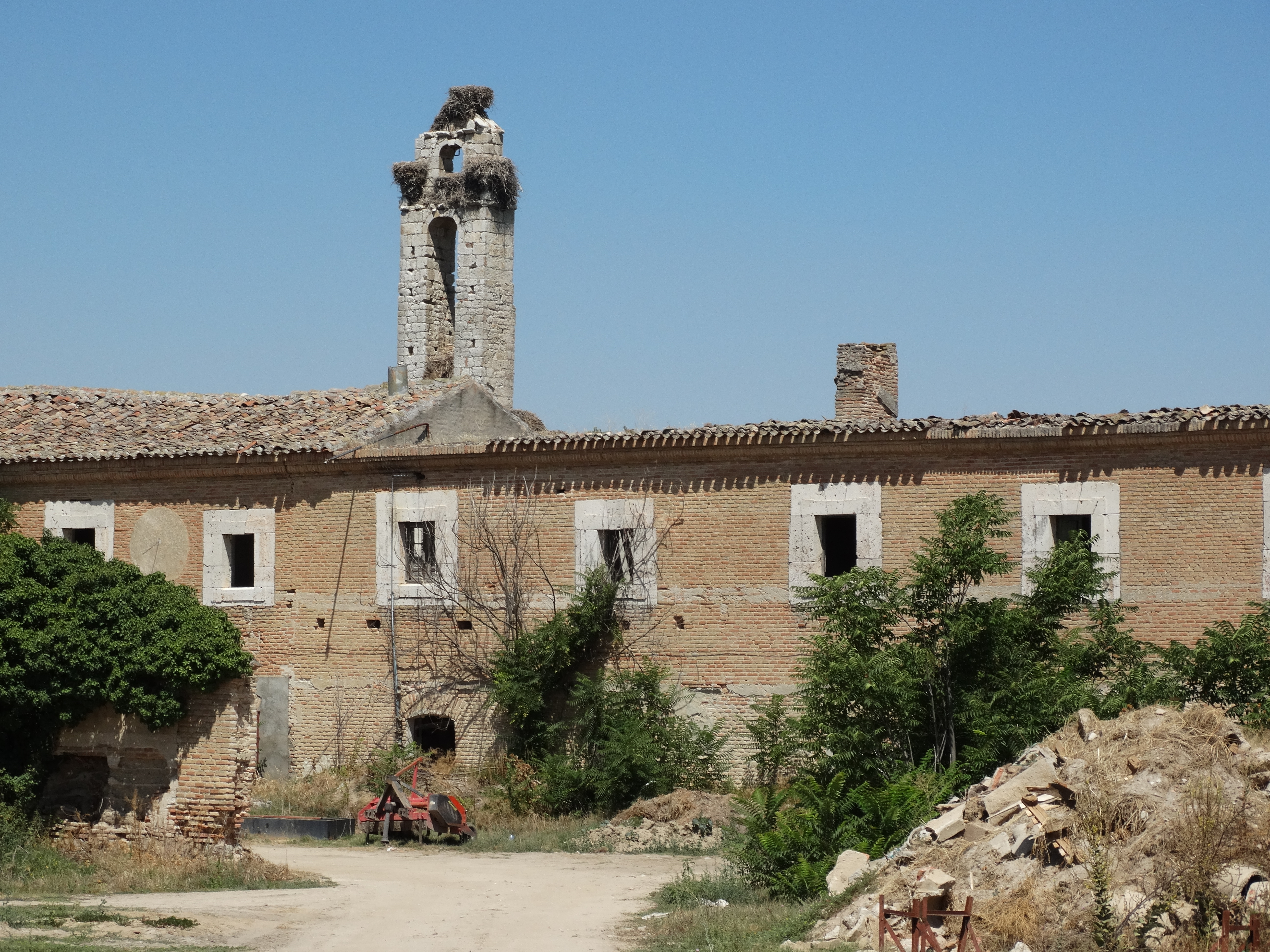 Ruinas del despoblado de Aniago en Valladolid, España. Celdas de los monjes del monasterio por la parte exterior.